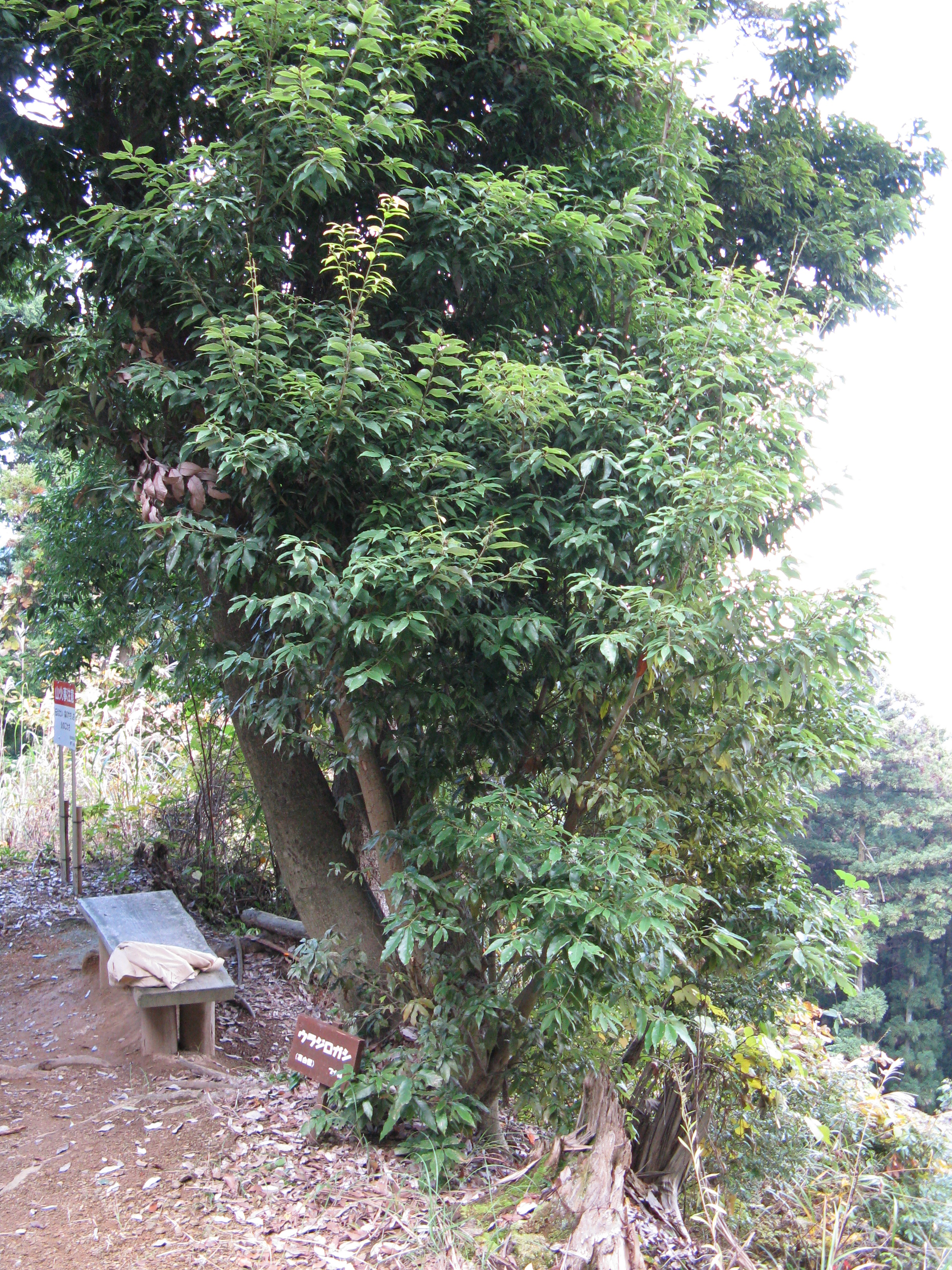 Quercus salicina